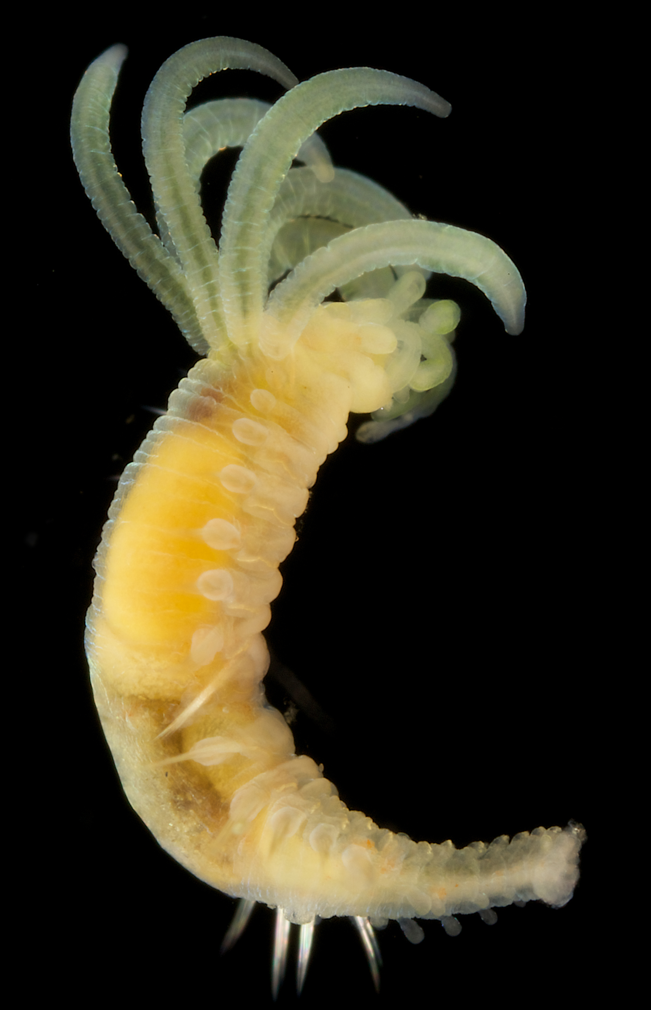 Amage auricula